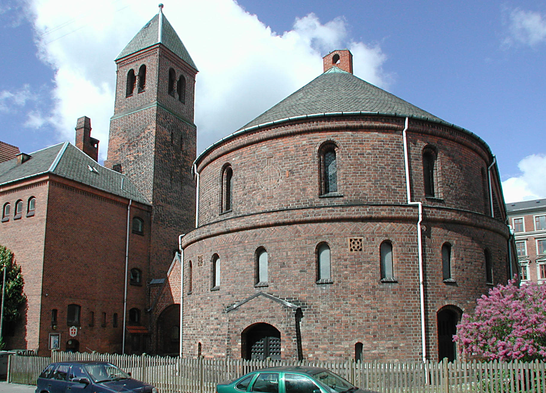 Immanuelskirken, Copenhagen, Denmark. Rear view.